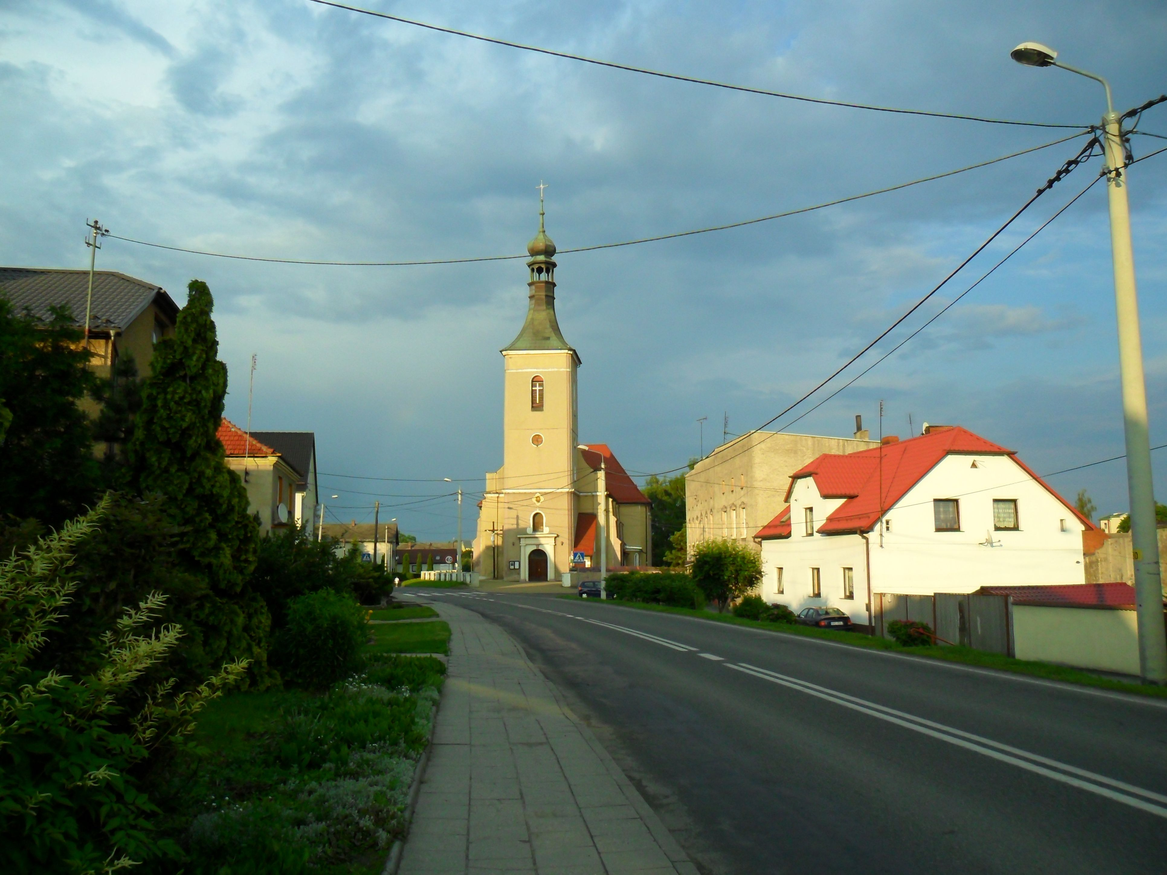 Pietrowice Wielkie - główna droga i widok na kościół parafialny